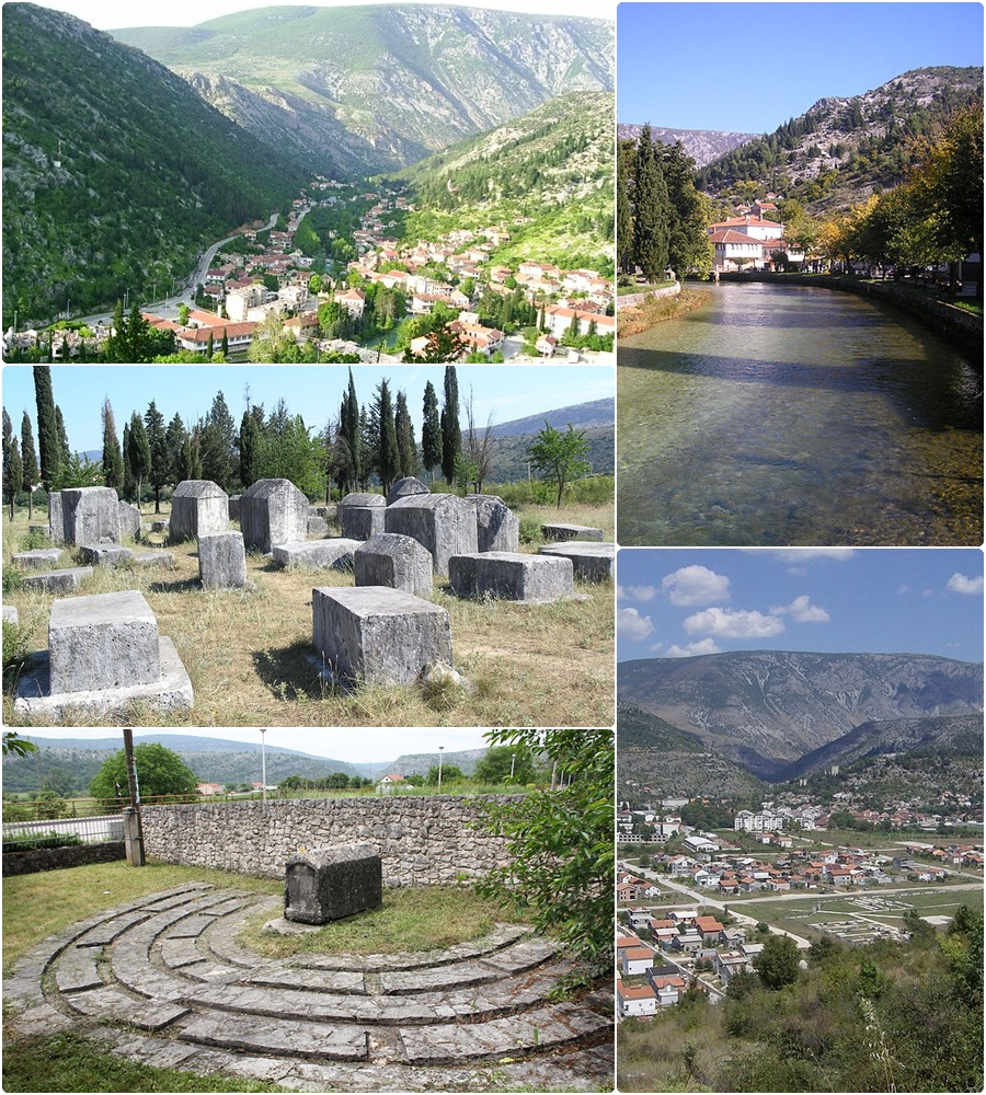 Stolac